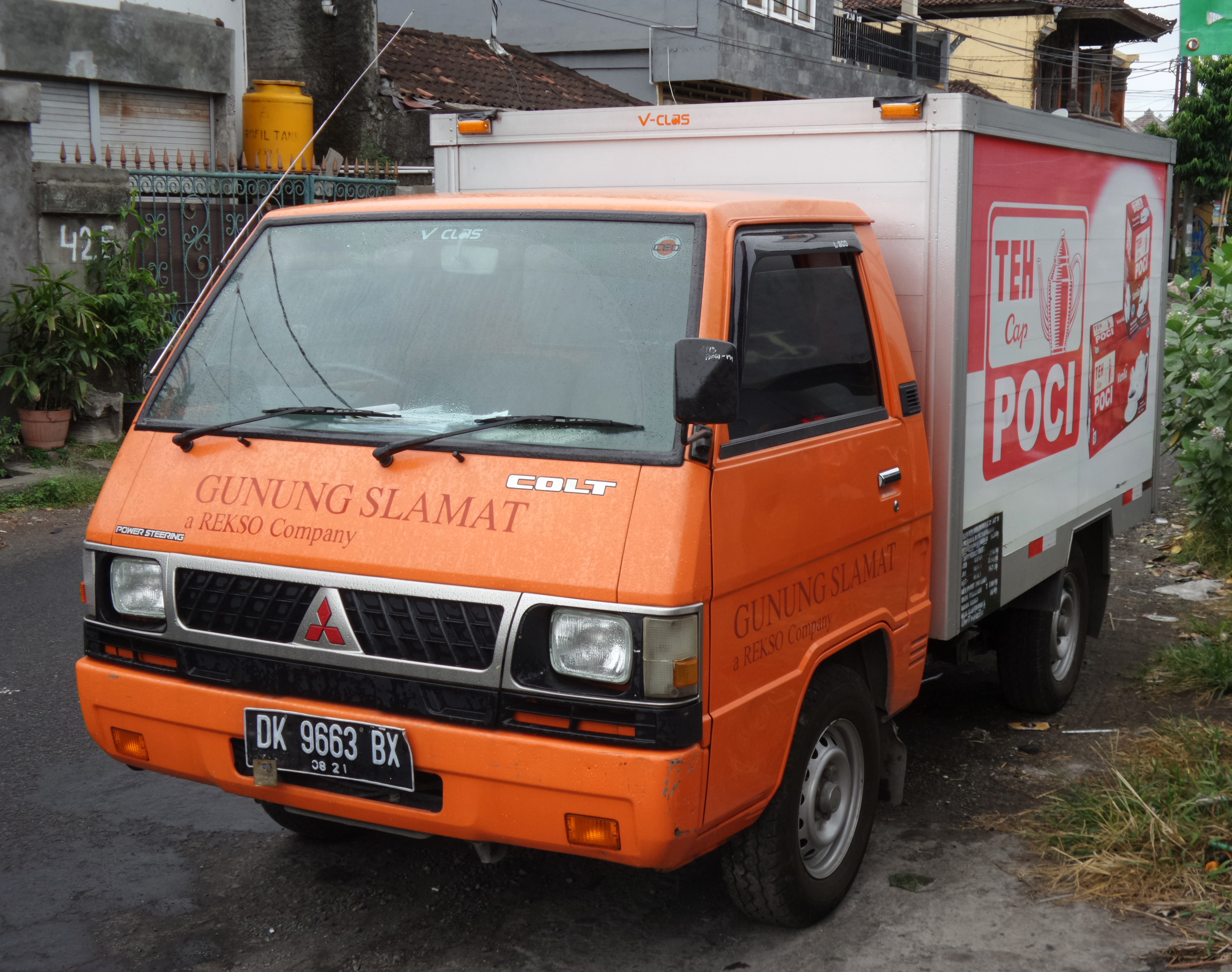 Mitsubishi Colt L300